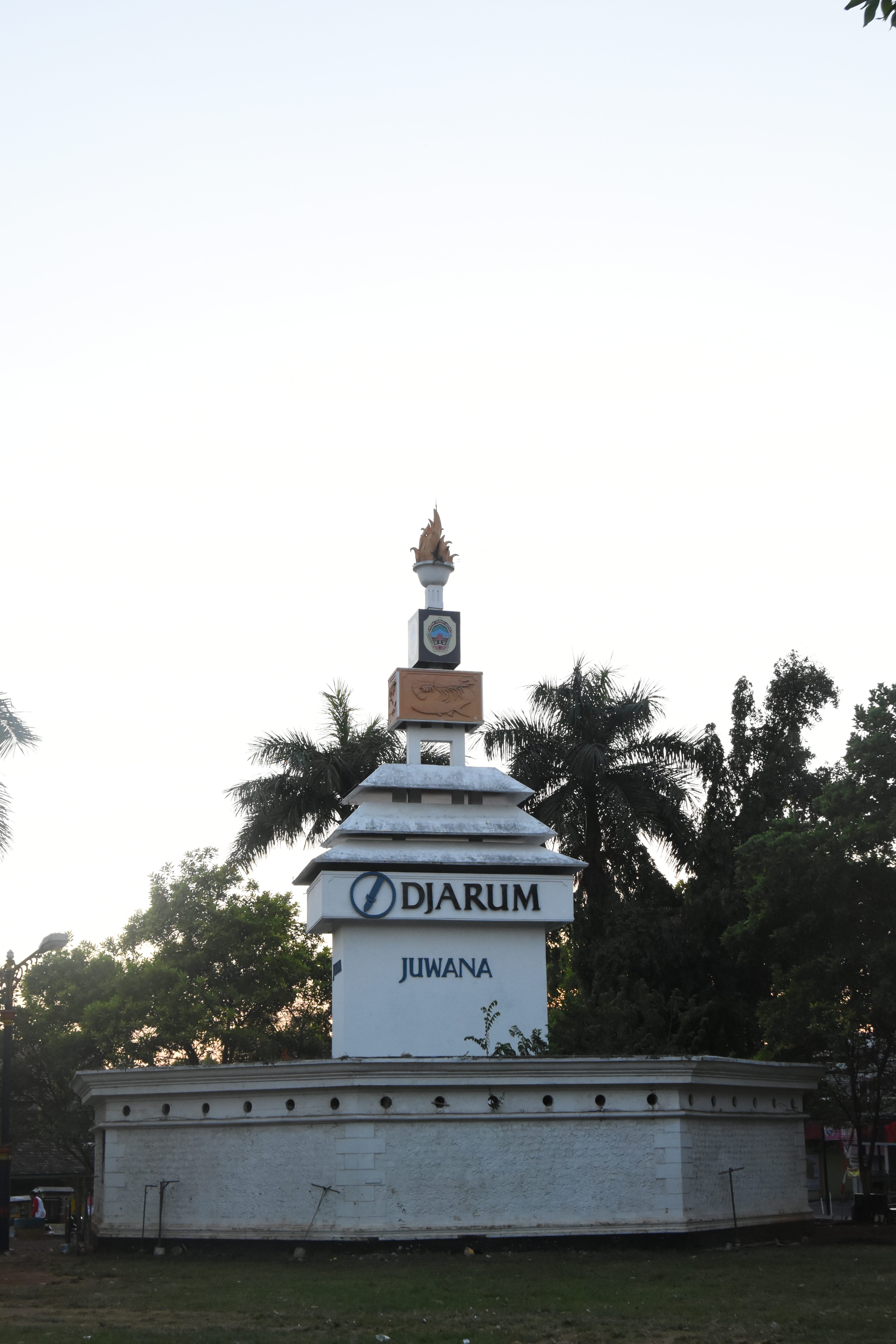 Salah satu landmark Kota Juwana